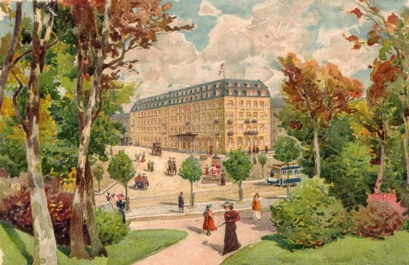 Das Hotel Hauffe in Leipzig vom Promenadenring gesehen